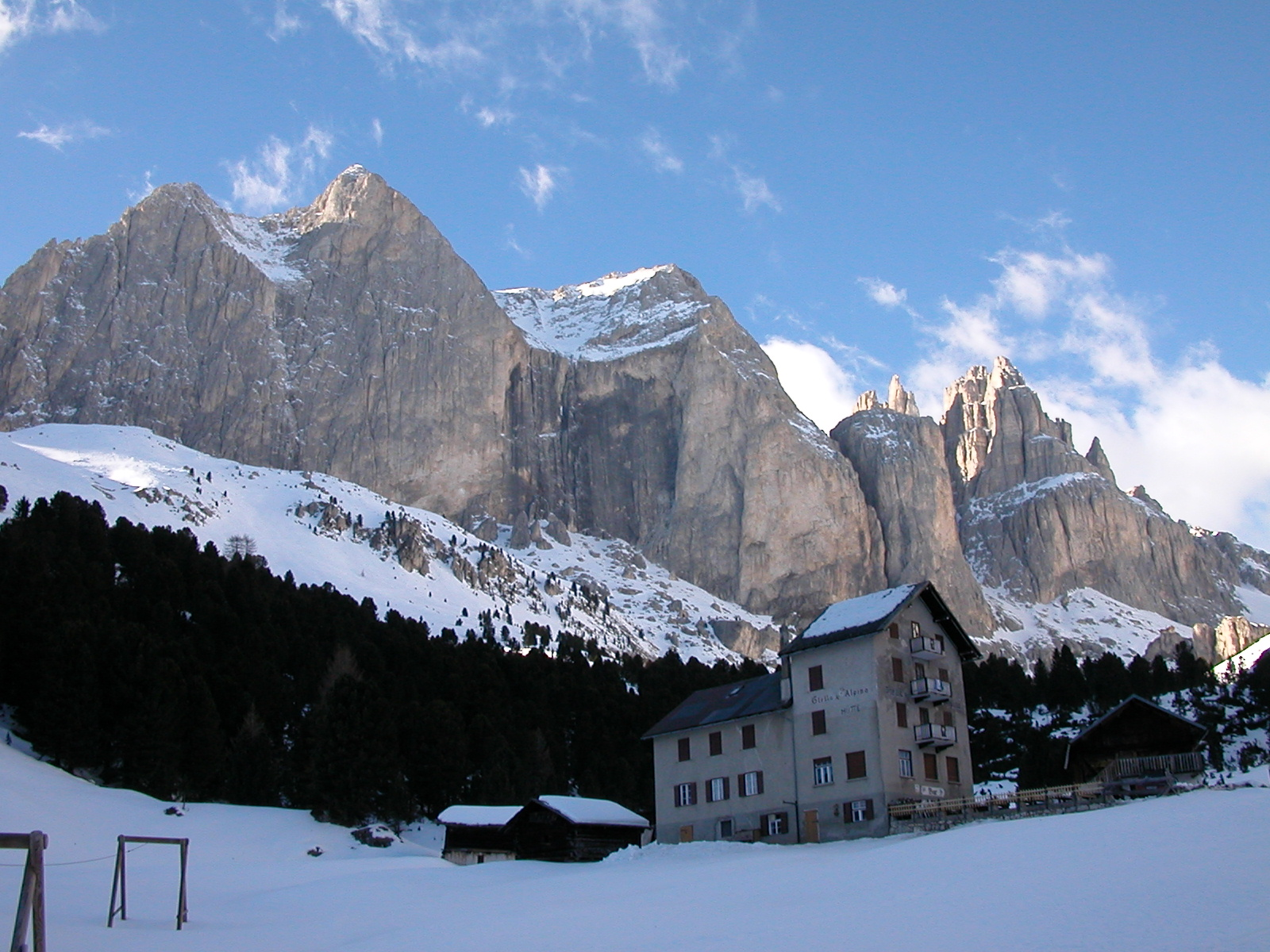 Rosengartengruppe - Rifugio Stella Alpina, 1960 m. Links die Rosengartenspitze mit ihrer bekannten Ostwand. Süd-, Haupt- und Nordgipfel. Ganz rechts die Vajolet-Türme